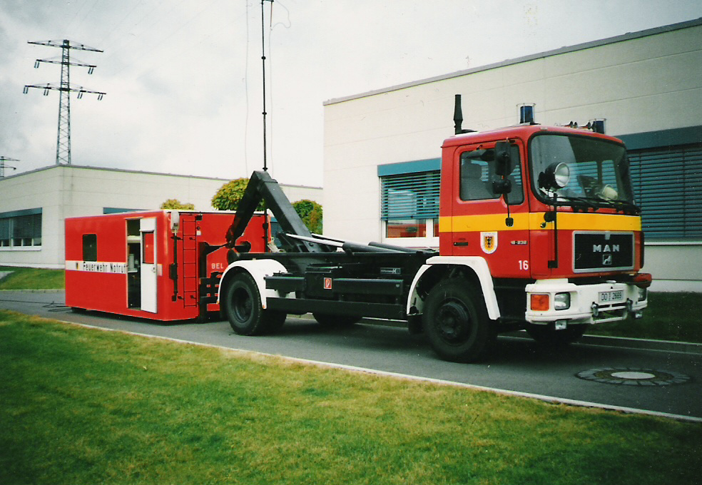 WLF16 der BF Dortmund mit AB-BEL1